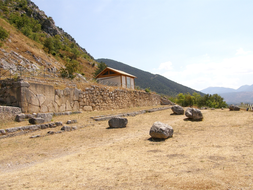 Sulmona